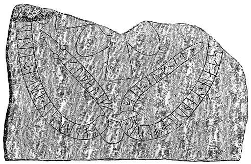 Teckning av runstenen U 992 i Funbo socken, Uppland.